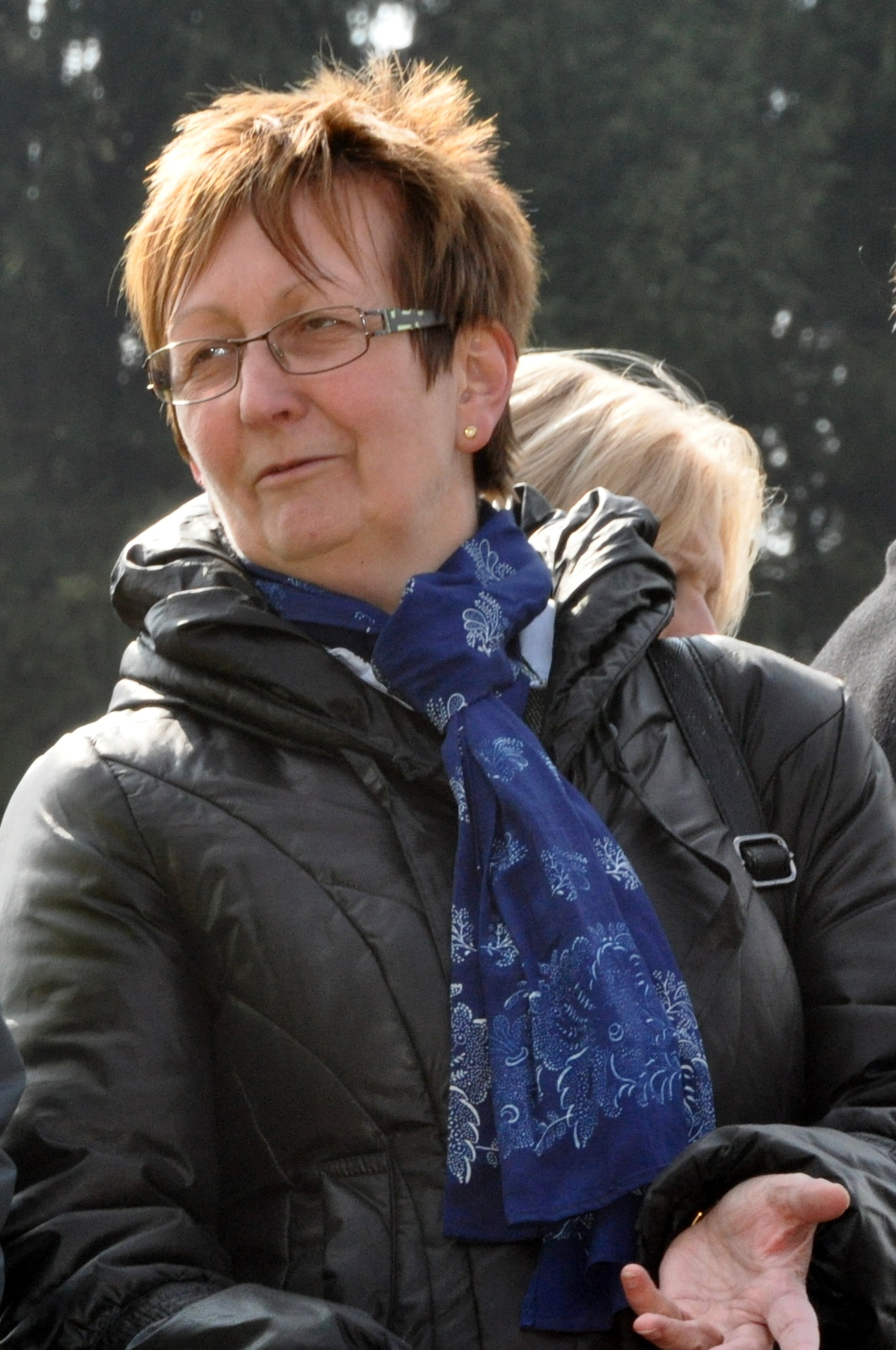 Ulrike Schwarz bei der Eröffnung des Hochwasser-Rückhaltebeckens Mühlholz in St. Gotthard im Mühlkreis